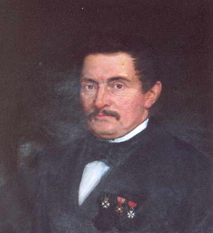 Zelf gemaakte foto van schilderij van Willem Albert Scholten in het Veenkoloniaal museum te Veendam. Publiek Domein wegens leeftijd .